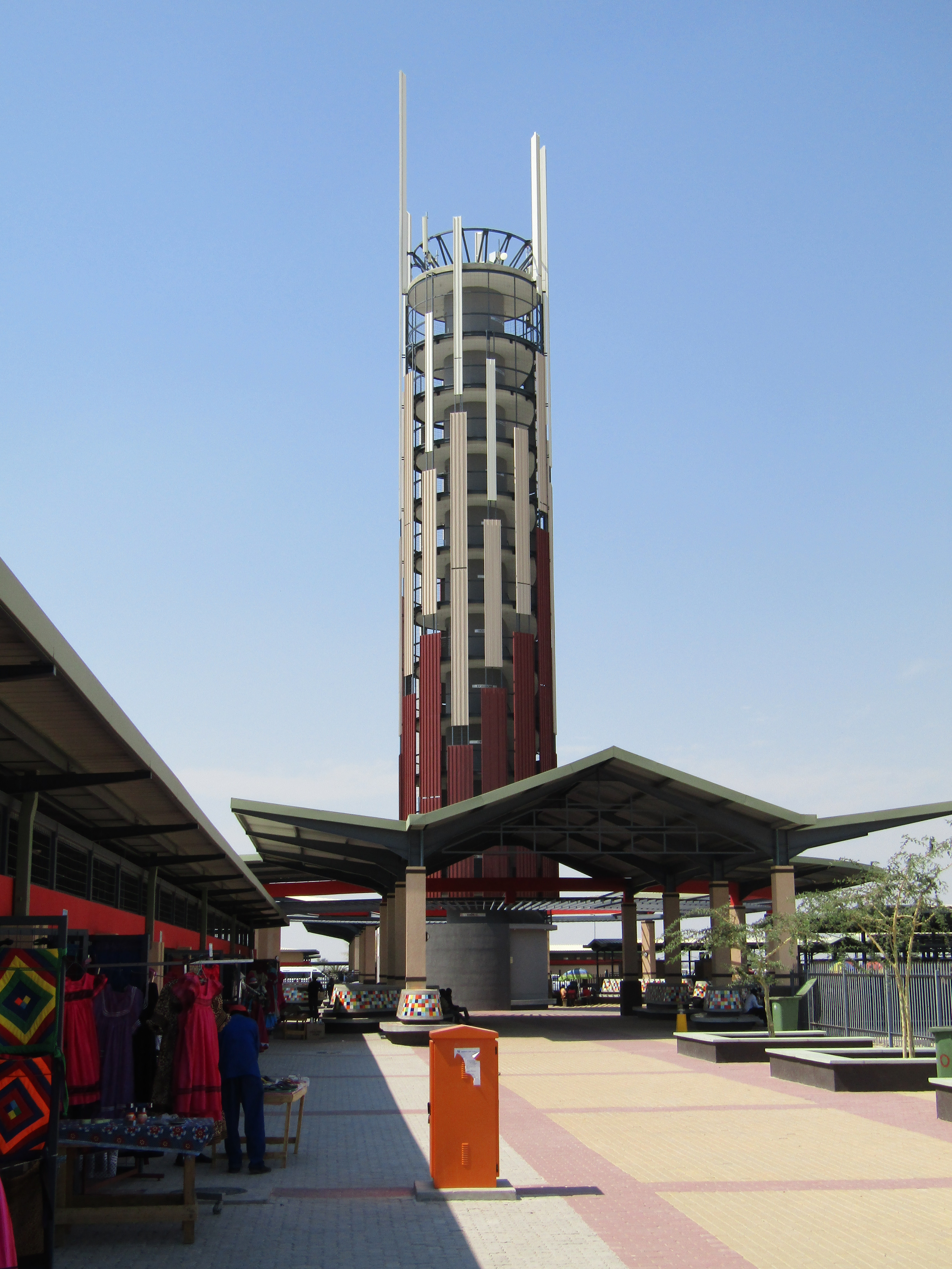 Oshungo ya Shakati , 48 m hoch, im Dr. Frans Aupa Indongo Open Market in Oshakati, am 11.3.2016 eroeffnet